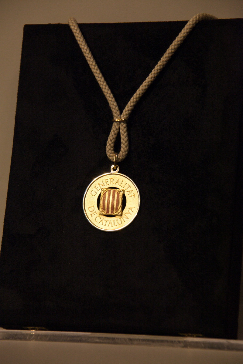 Medalla d'Or de la Generalitat de Catalunya. Acte de lliurament a Jordi Savall. Barcelona, 17-10-2014